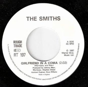 Foto de de un disco de vinilo de 7" de la discografica Rough Trade Records.